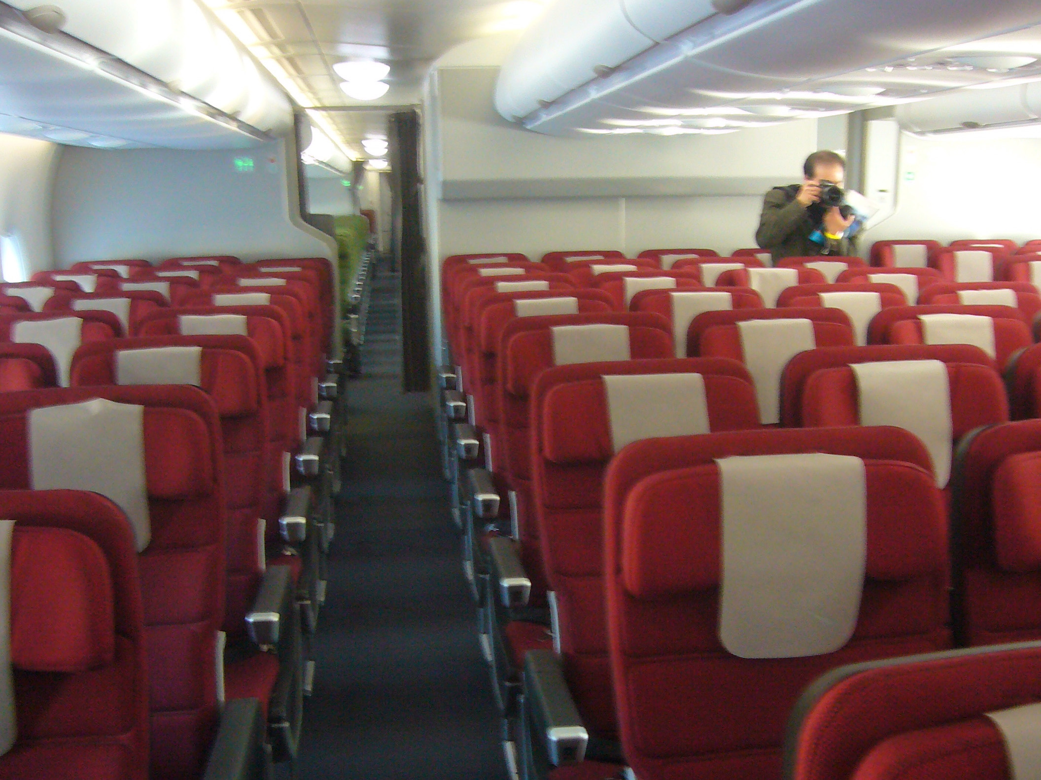 L1140523.JPG